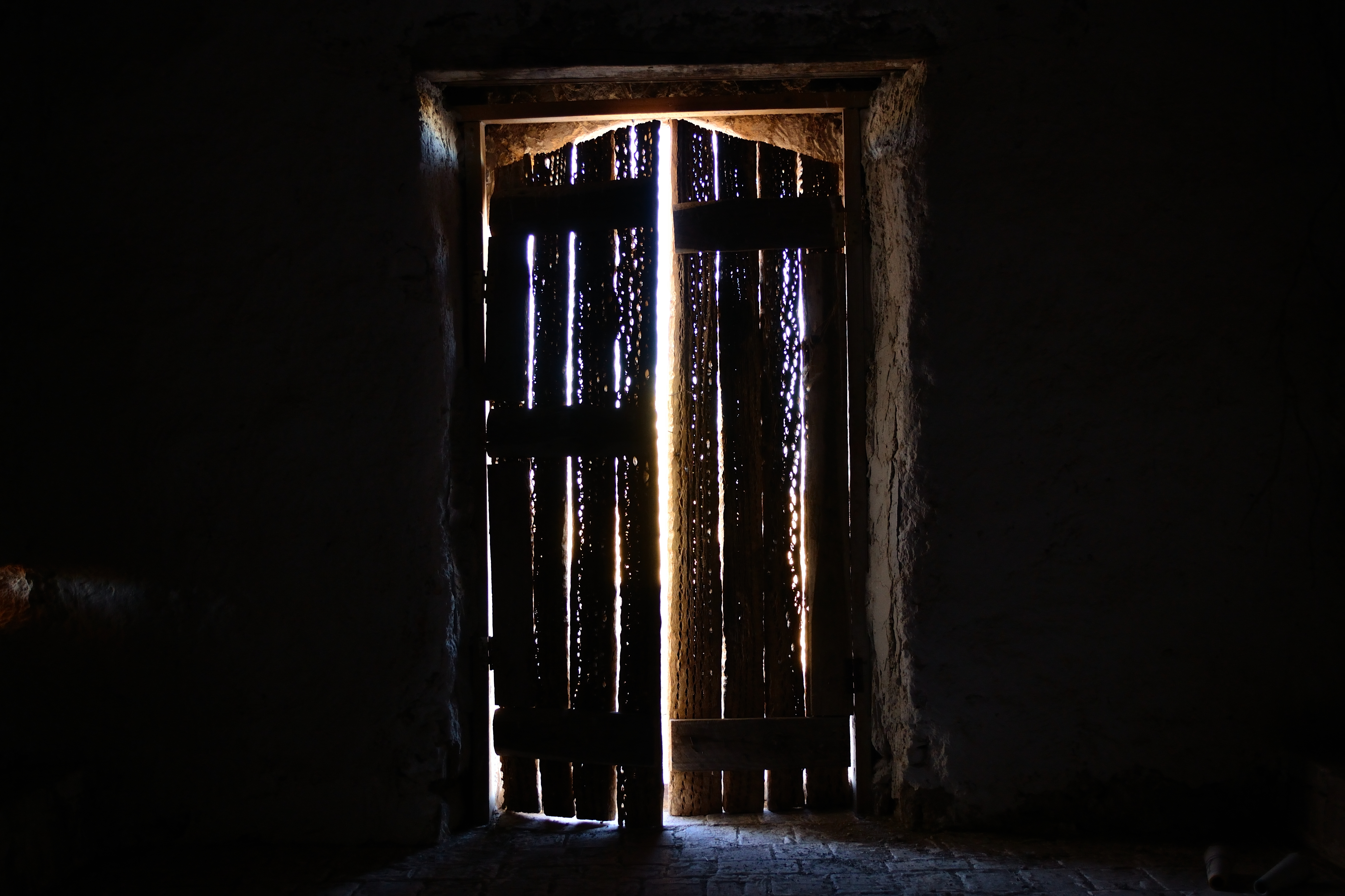 Iglesia de Achauta. This is a photo of a national monument in Chile: 1000